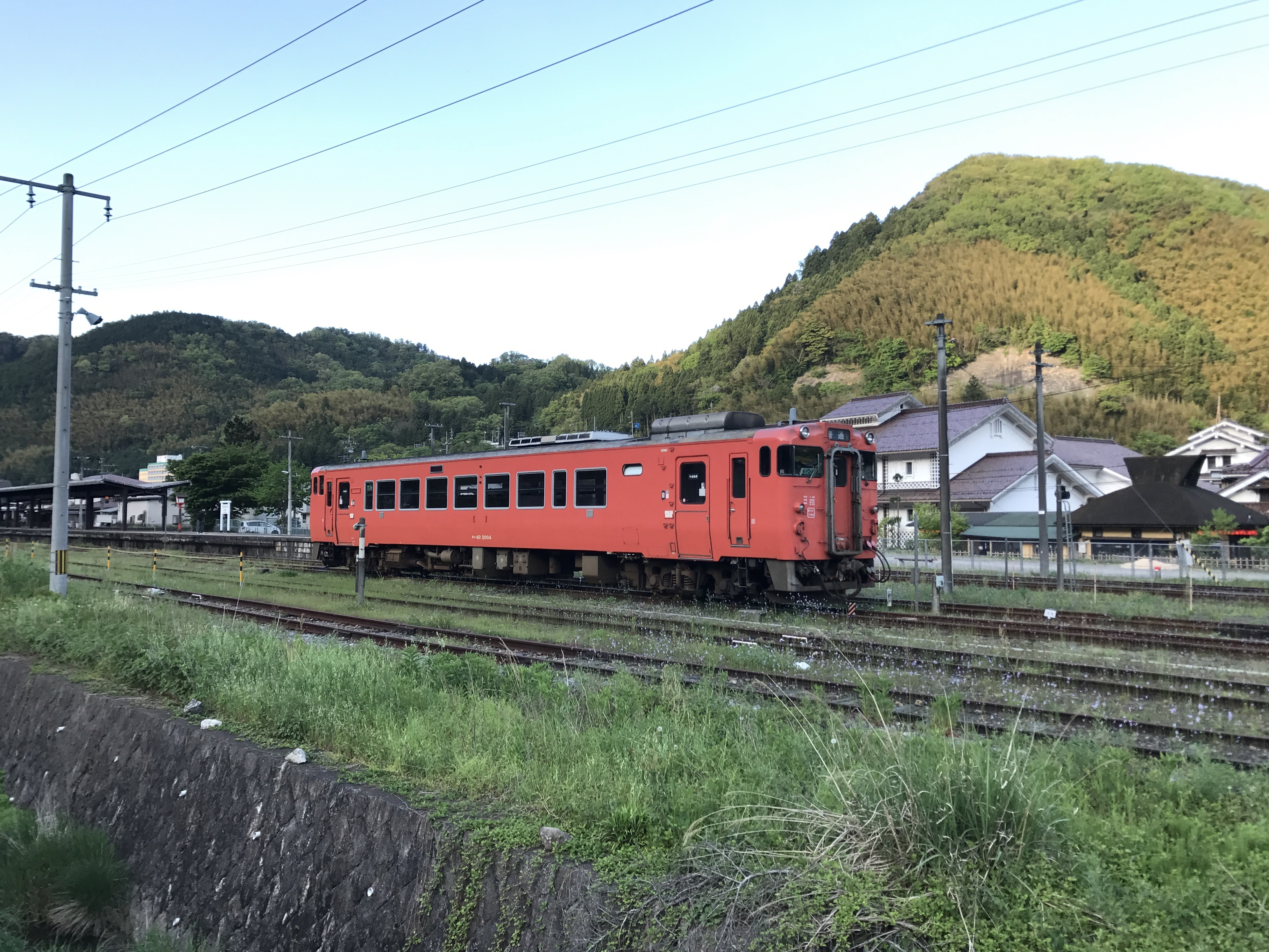 津和野駅構内にて留置中の列車